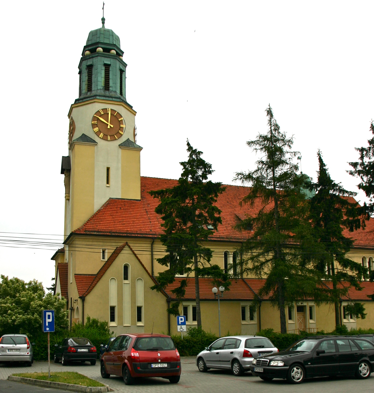 Dobrzeń Wielki - rzymskokatolicki kościół parafialny pw. św. Katarzyny Aleksandryjskiej.